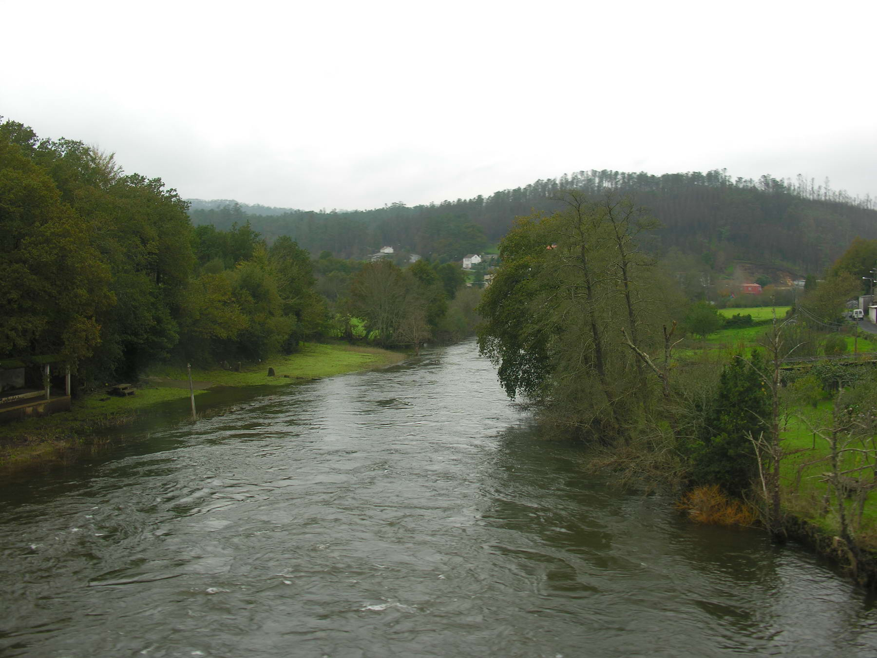 Río Tambre na parroquia de Portomouro, Val do Dubra, Galiza Publish by= Luis Miguel Bugallo Sánchez.